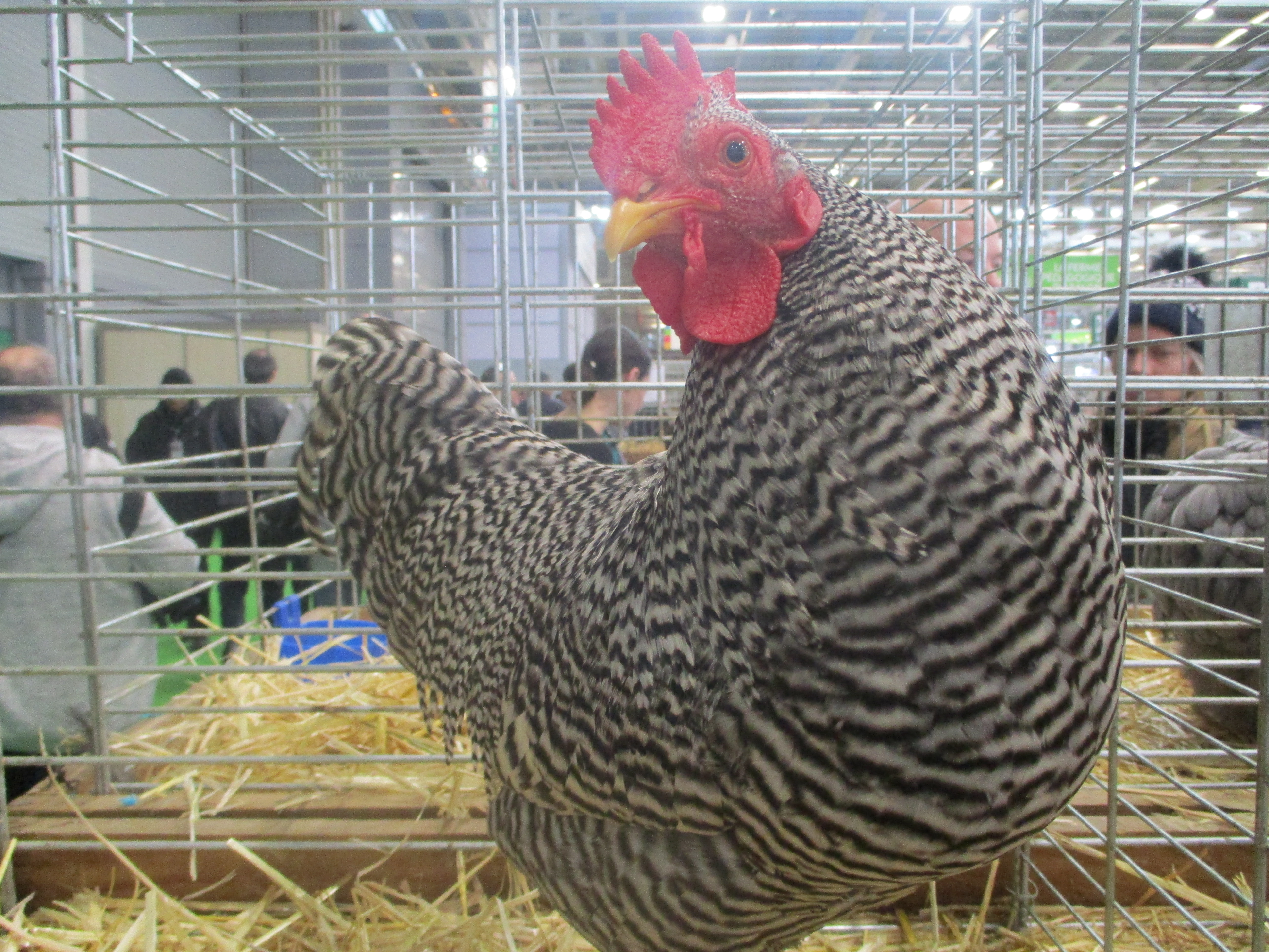 Coq amrock barré au SIA 2020.